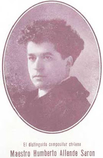 El compositor chileno Pedro Humberto Allende en su juventud